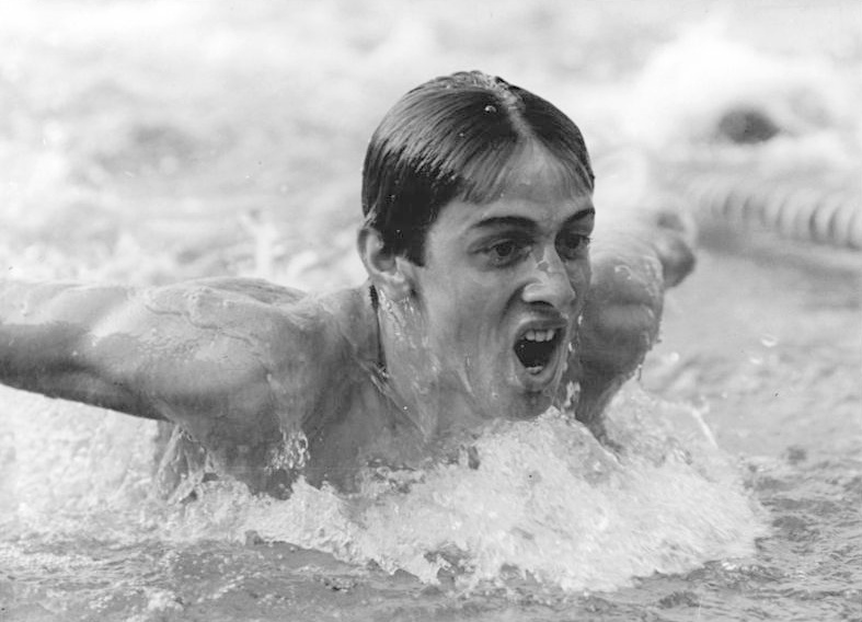 Roland Matthes Zentralbild Kluge 11-4-70-Vorbereitung Schwimmländerkampf der Freundschaft UdSSR - DDR vom 13. - 15.4.70 in der Neptun-Schwimmhalle von Nowosibirsk-Der zweifache Olympiasieger Roland Matthes wird auf der Rückenstrecke sowie im Lagenschwimmen über 200-m kaum zu bezwingen sein. Der junge Erfurter ist mit seinem Talent eine Ausnahmeerscheinung im internationalen Schwimmsport und wird sicherlich für wertvolle Punkte der DDR-Mannschaft sorgen.